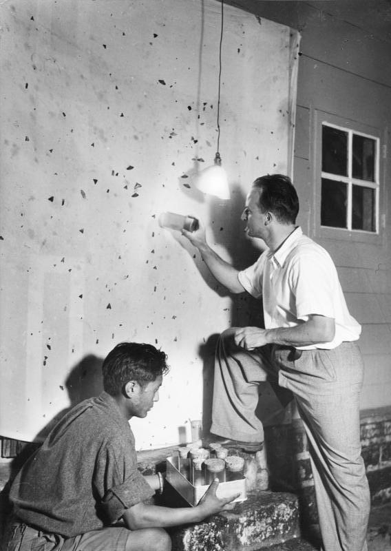 Tibetexpediton, Beim Insektenfangen Gangtok, Krause und Mingma beim Insektenfang (Lichtfang) Abgebildete Personen: Krause, Ernst: Mitarbeiter im Sven-Hedin-Institut, Deutschland Information added by Wikimedia users.